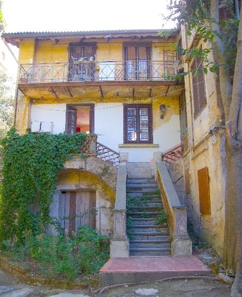 Napoli, Palazzo Torre Palasciano.